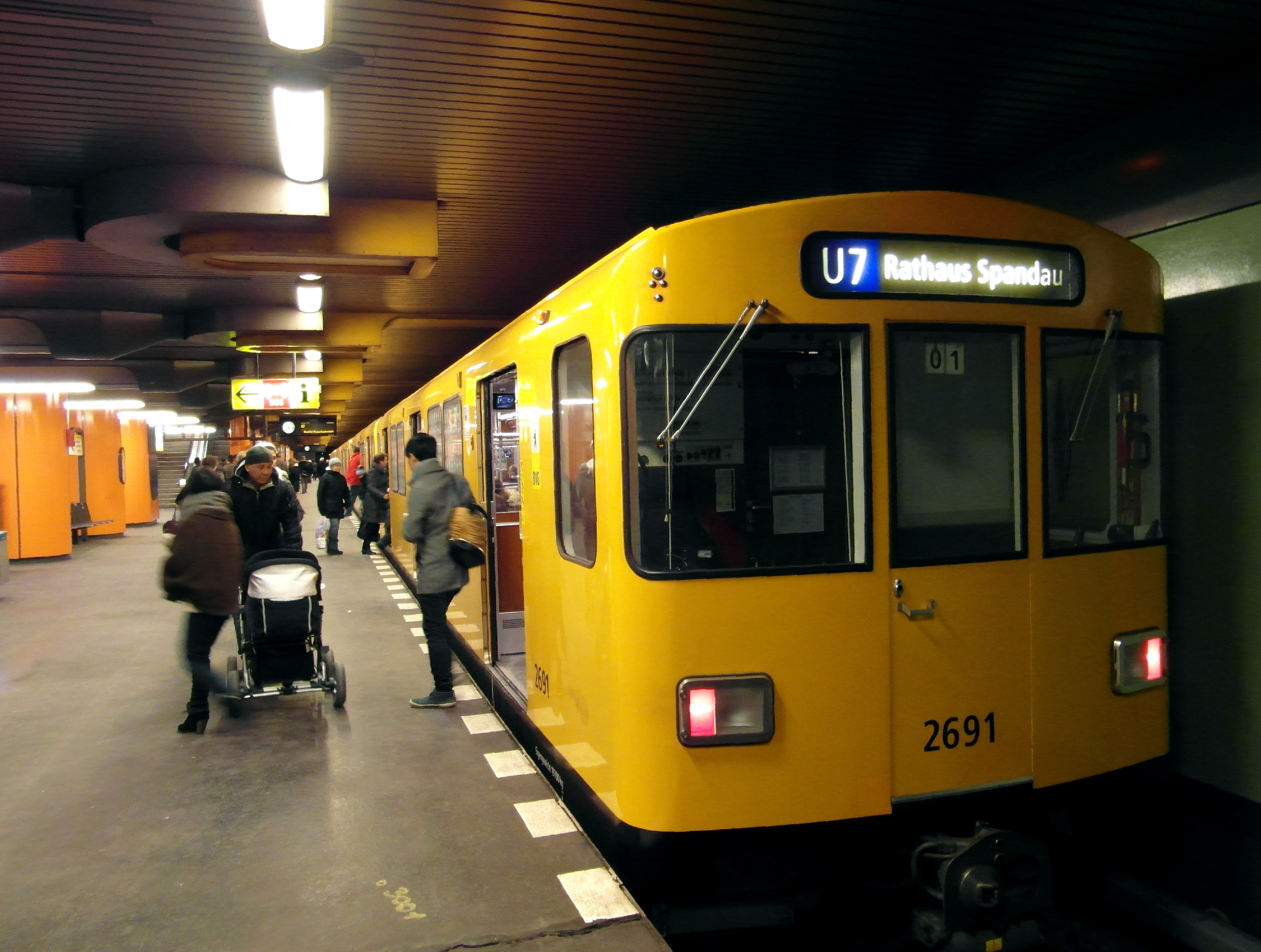 Linie U7